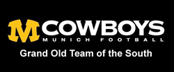 eigenes avatar für Benutzerraum